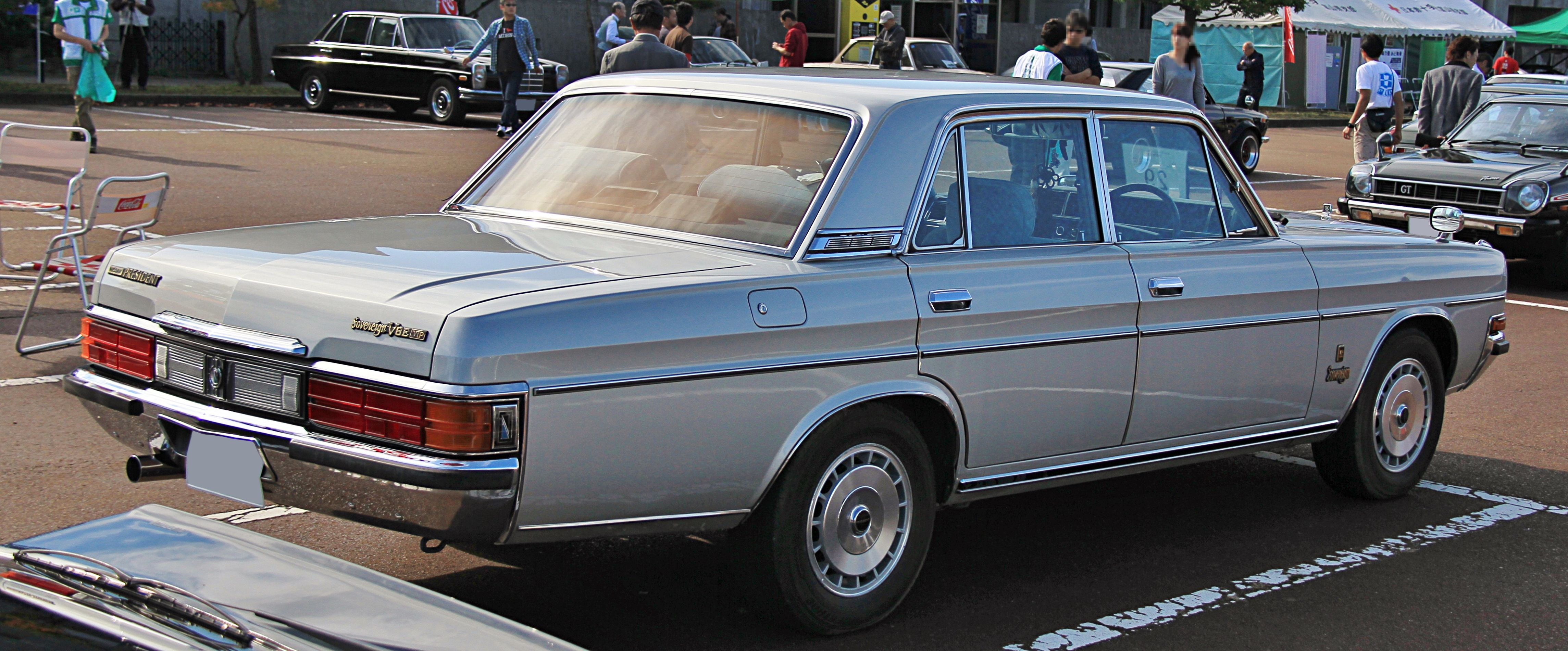 Nissan E-H252